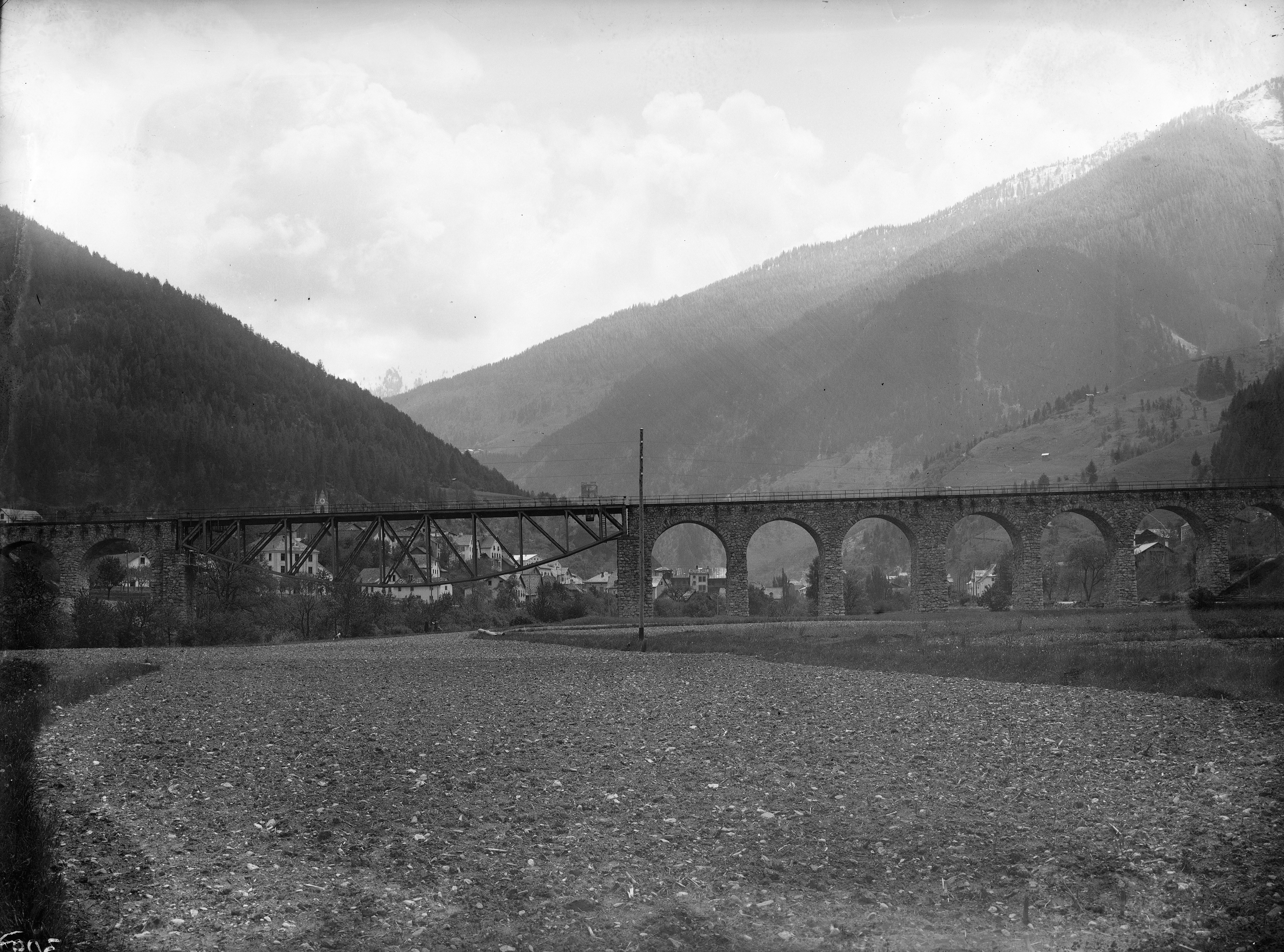 Aufnahme von der alten Innbrücke zwischen Landeck und Landeck-Perfuchs im km 73,4 / Josef Wilhelm Purtscher